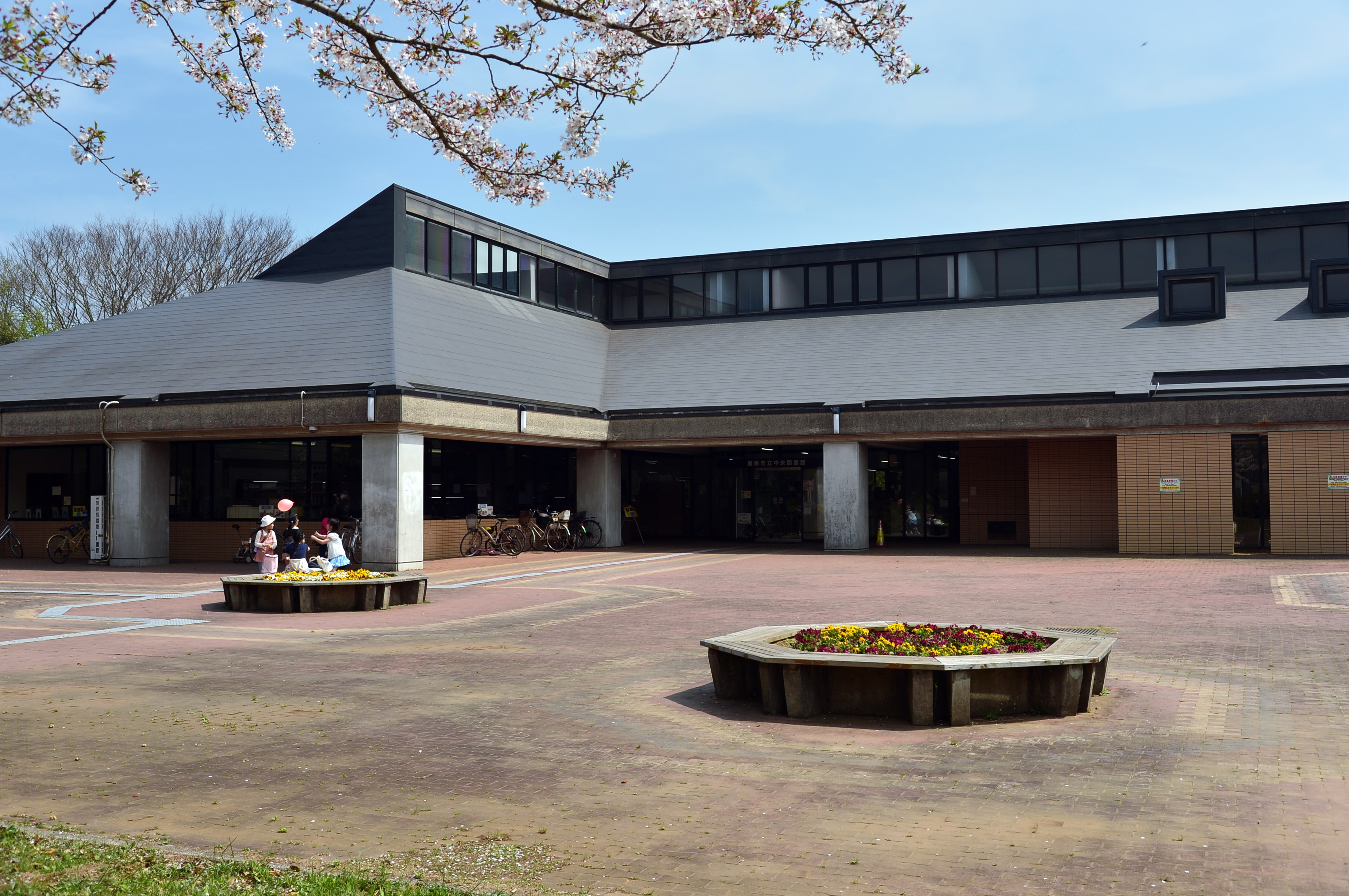 鹿嶋市立中央図書館